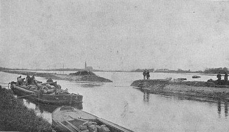 Dijkdoorbraak in de Poldervaart in 1903. Op de achtergrond Kethel. Foto van prentbriefkaart uit 1903, fotograaf onbekend